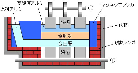 三層電解法。Wordとペイントで作成。